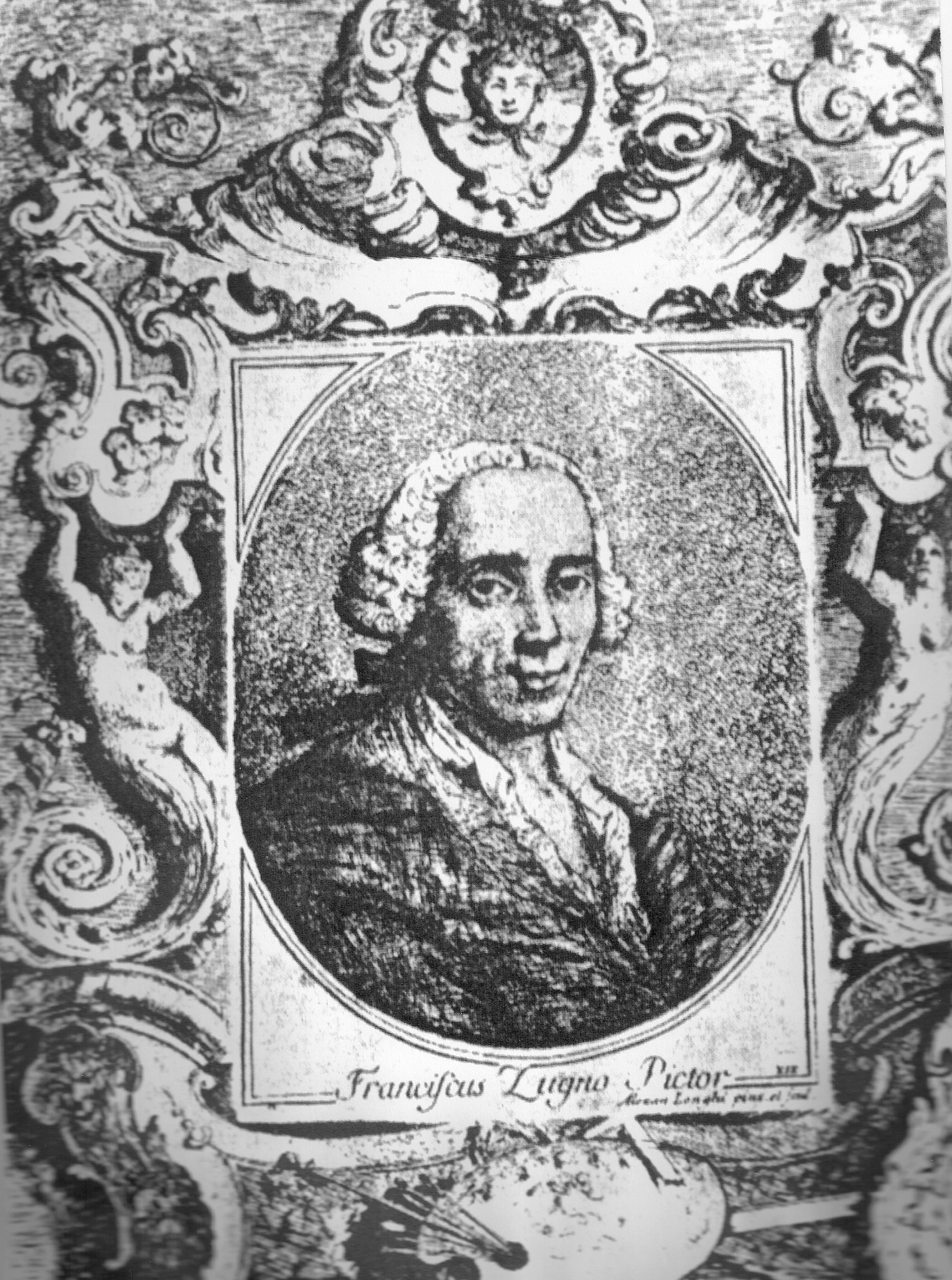 Gravure représentant le peintre Francesco ZUGNO (1709-1787) faite par Alessandro LONGHI pour illustrer son livre "Compendio delle vite de'Pittori Veneziani (...), Venise, 1762, XIX.